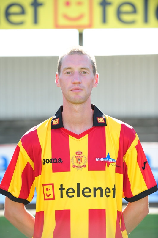 Kevin Geudens